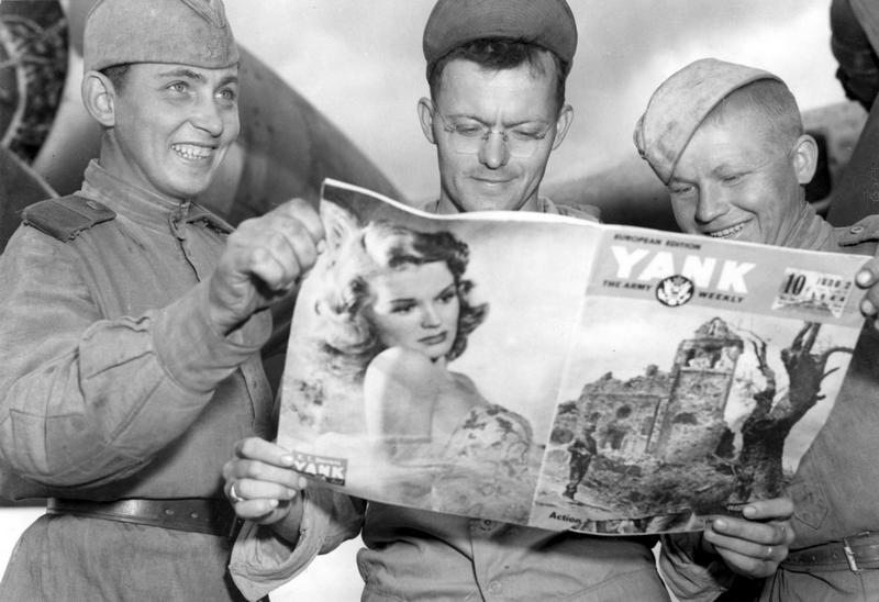 Полтава, летовище. 1944